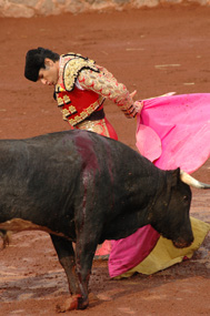 El matador Humberto Flores hace gala de su arte con el capote en la Feria de Tecamac. Abril de 2006 Esta imagen es liberada por el autor usuario:Carlos Castañeda Girón bajo la licencia GFDL. Mayo de 2006